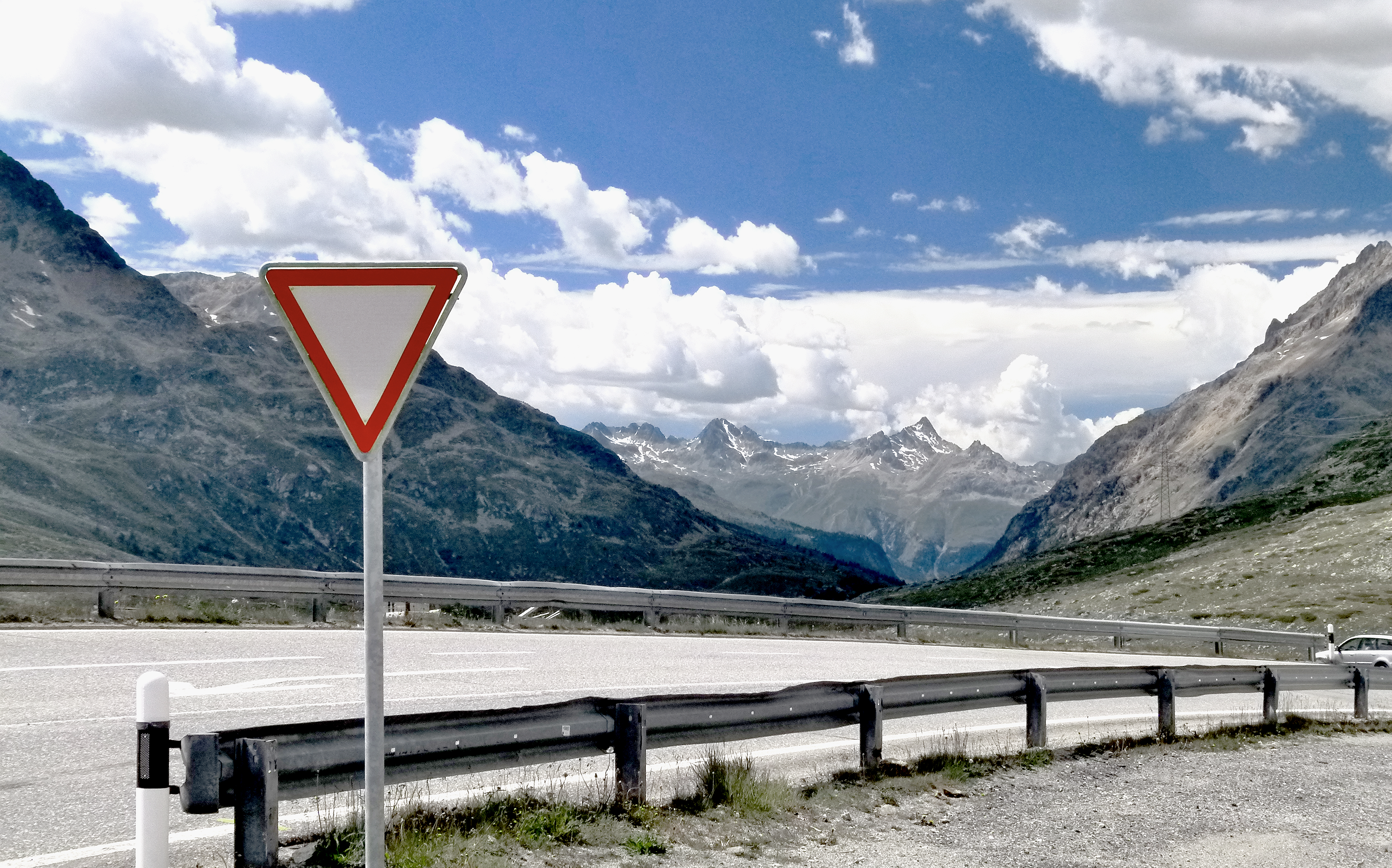 Bernina-hágó, Svájc